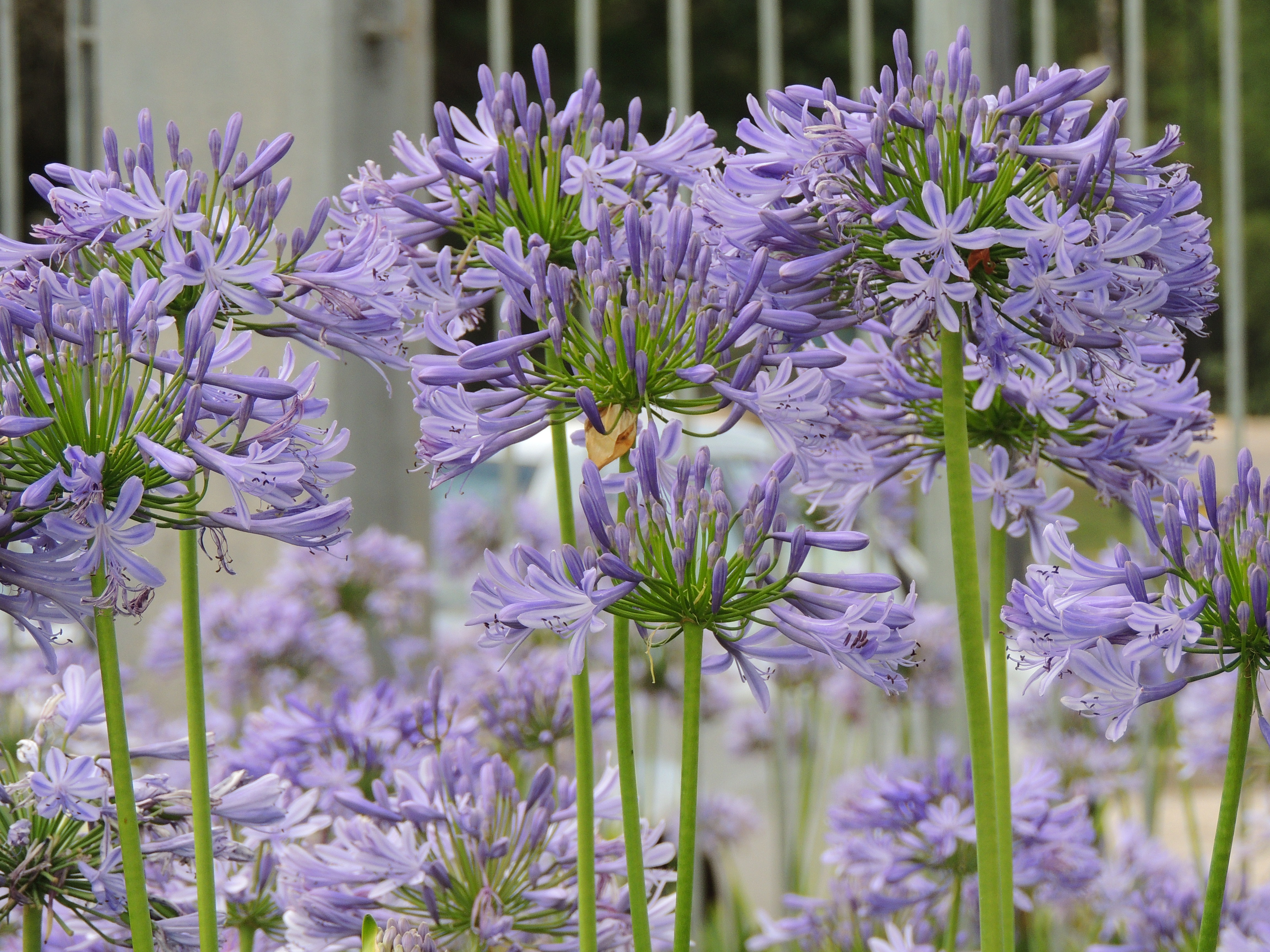 Agapanto ou lírio-africano.